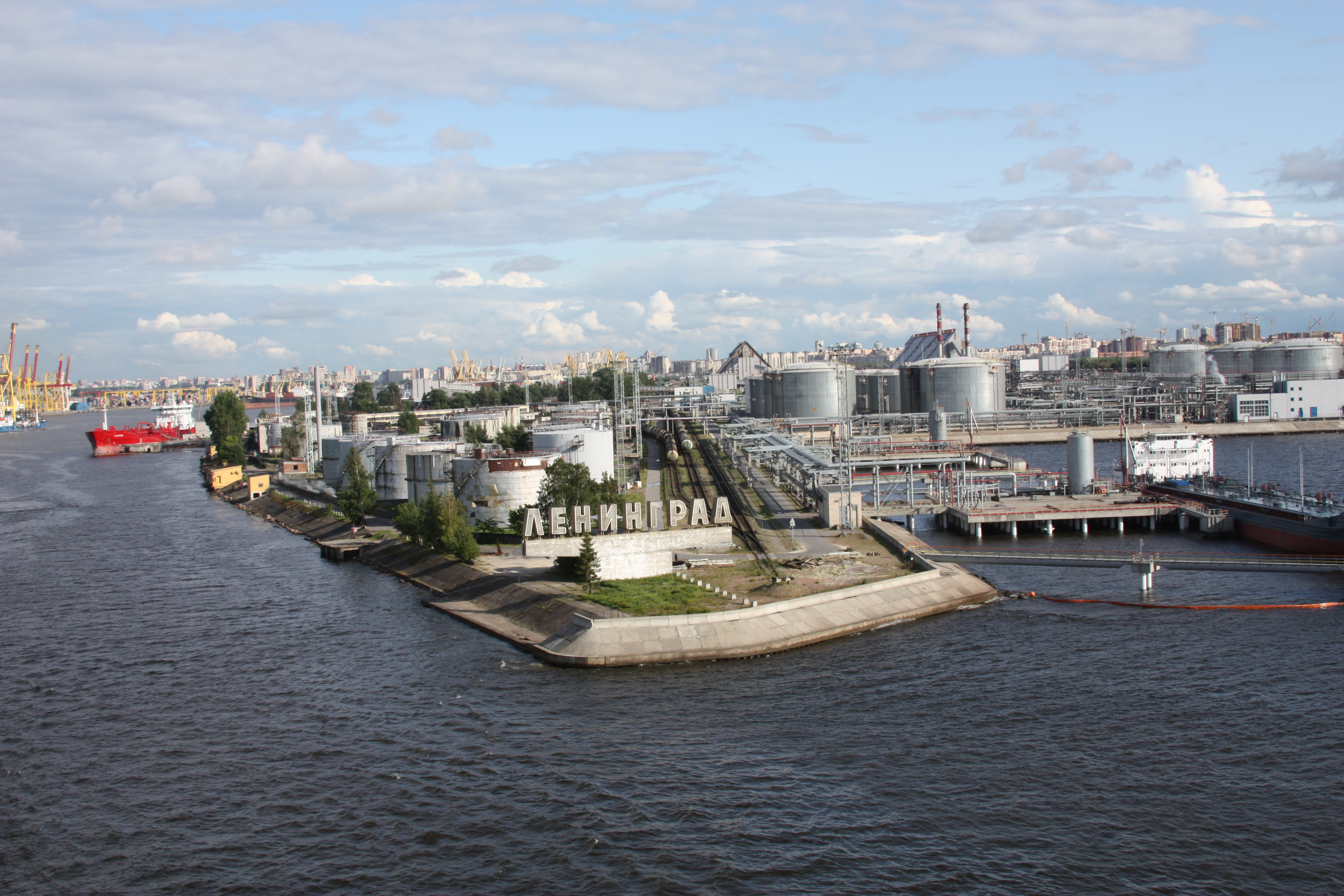 Port of Sain Petersburg Russia 2009